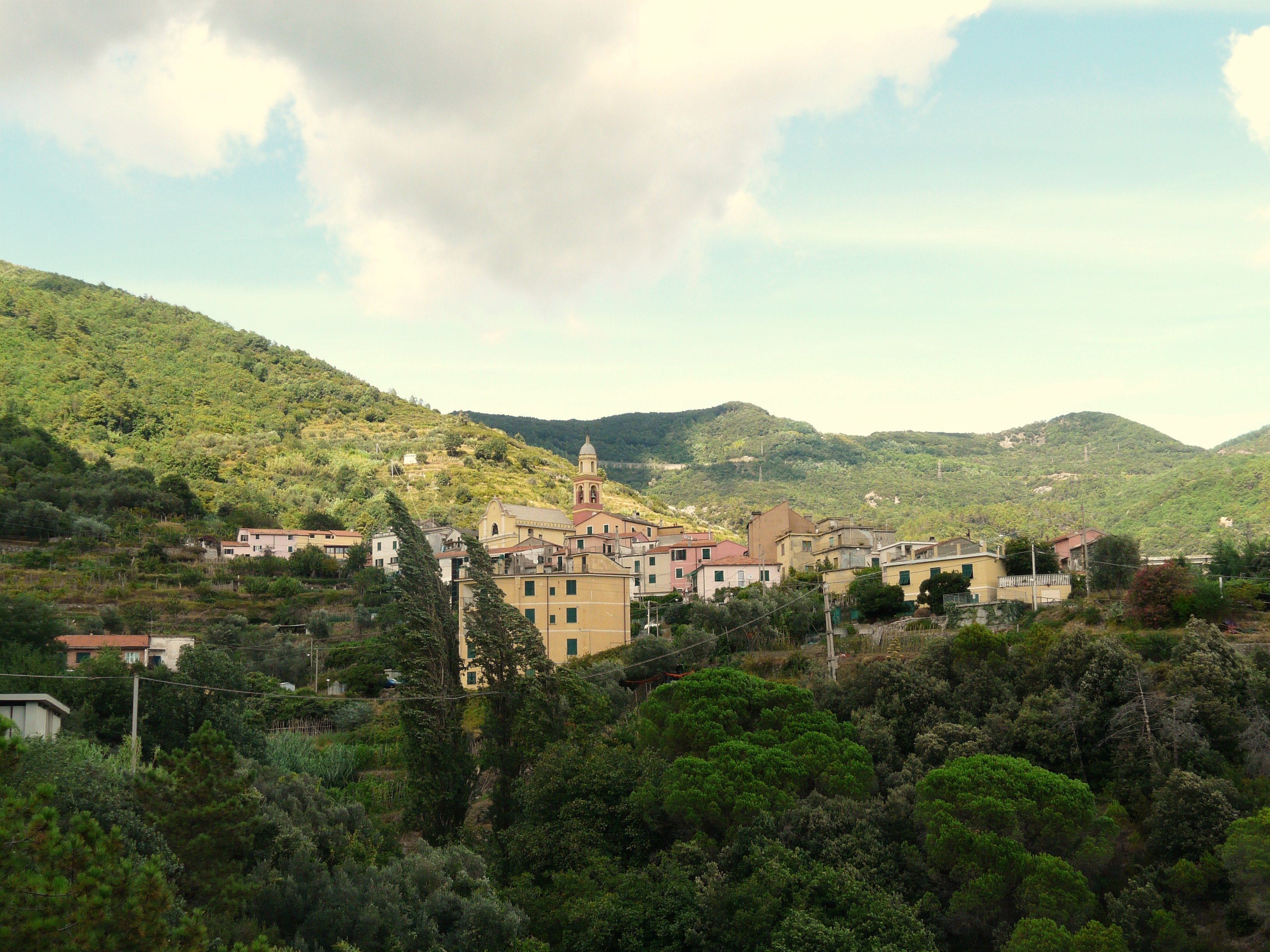 Panorama di Mezzema, Deiva Marina, Liguria, Italia